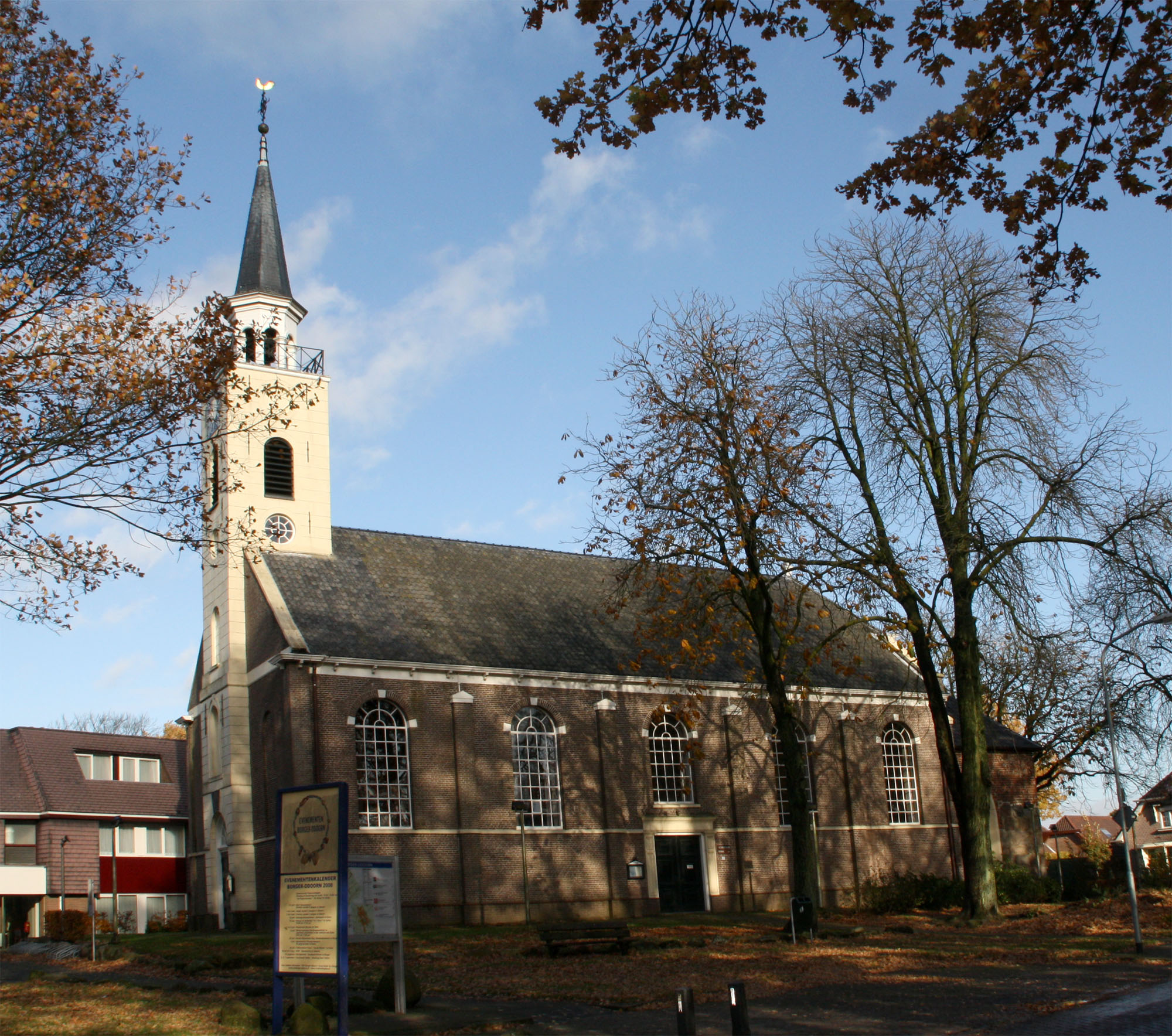 Ned.Herv.Kerk, Valtherweg bij 1, Odoorn (gemeente Borger-Odoorn). Rijksmonument nr: 31221. Smal rechthoekig koor van omstreeks 1200, bekleed met of opgetrokken van behakte granieten zwerfstenen. Kerk van 1856.